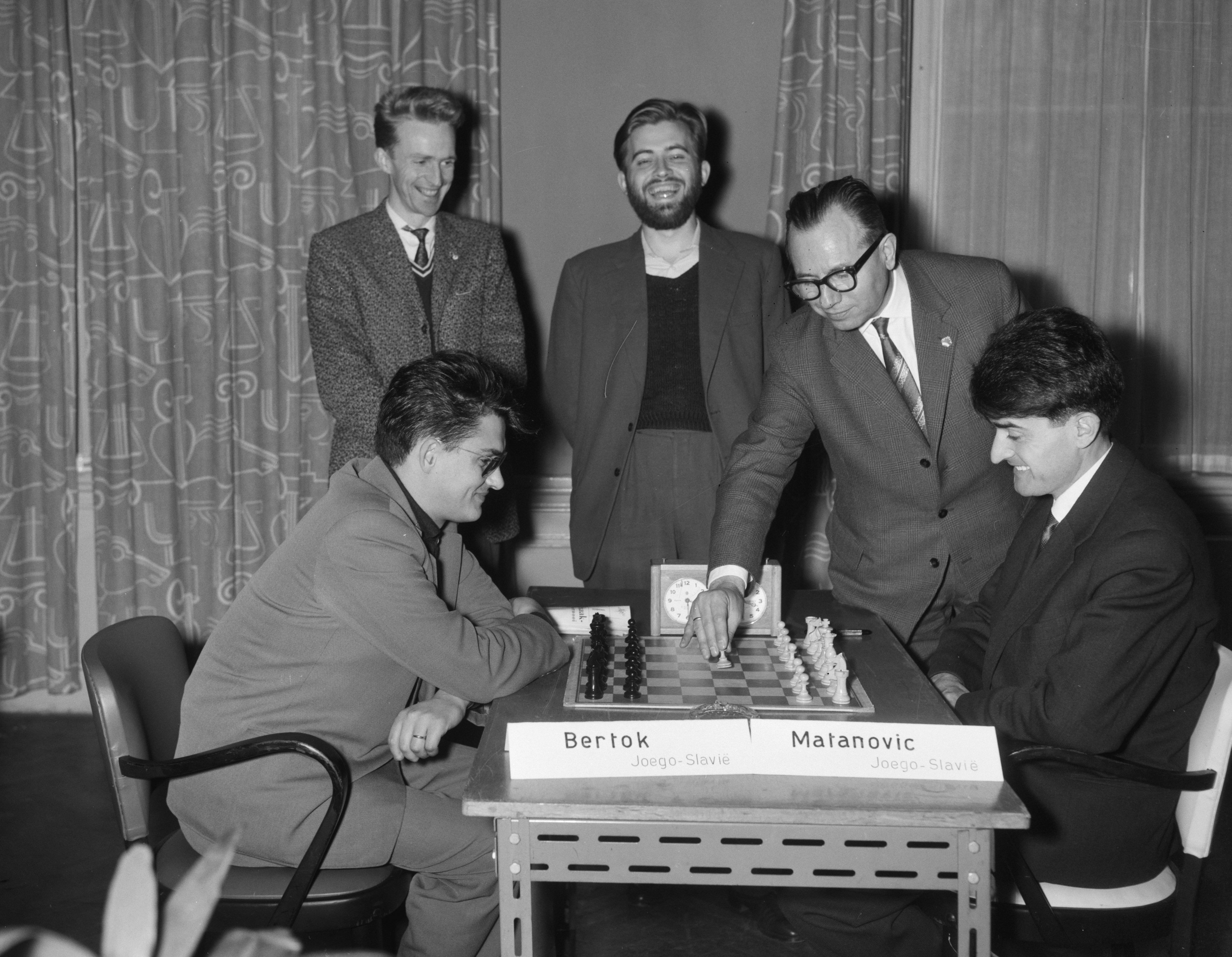 Collectie / Archief : Fotocollectie Anefo Reportage / Serie : [ onbekend ] Beschrijving : Beslissingsvierkamp om 2 plaatsen in het Interzonale Toernooi, v.l.n.r. Bilek, Olafsson, Larsen, wedstrijdleid N. de Groot en Matanovic Datum : 20 november 1960 Trefwoorden : schakers, toernooien, wedstrijdleiders Persoonsnaam : Bilek, N. de Groot, Olafsson, Fridrik Fotograaf : Bilsen, Joop van / Anefo Auteursrechthebbende : Nationaal Archief Materiaalsoort : Negatief (zwart/wit) Nummer archiefinventaris : bekijk toegang 2.24.01.04 Bestanddeelnummer : 911-7976